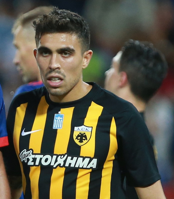 ЦСКА - АЕК